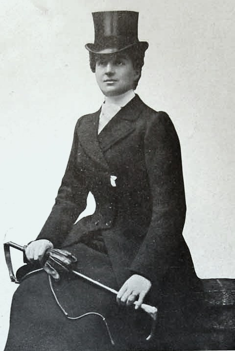 София Илларионовна Демидова, ур. Воронцова—Дашкова (1870—1953)